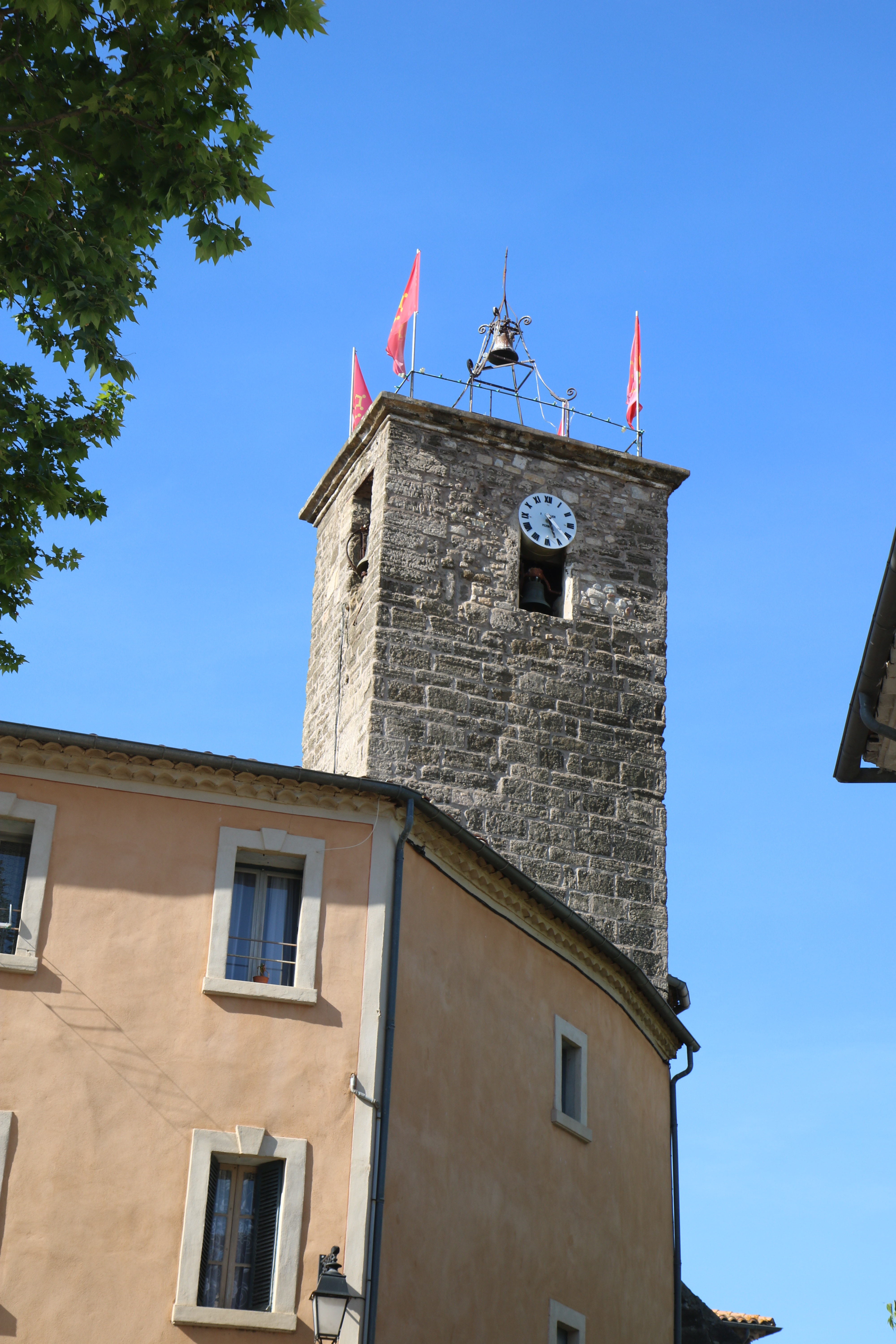 Adissan (Hérault) - clocher de l'église Saint-Adrien